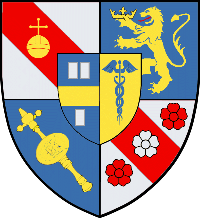 Vapensköld för friherrliga ätten Brauner nr 320